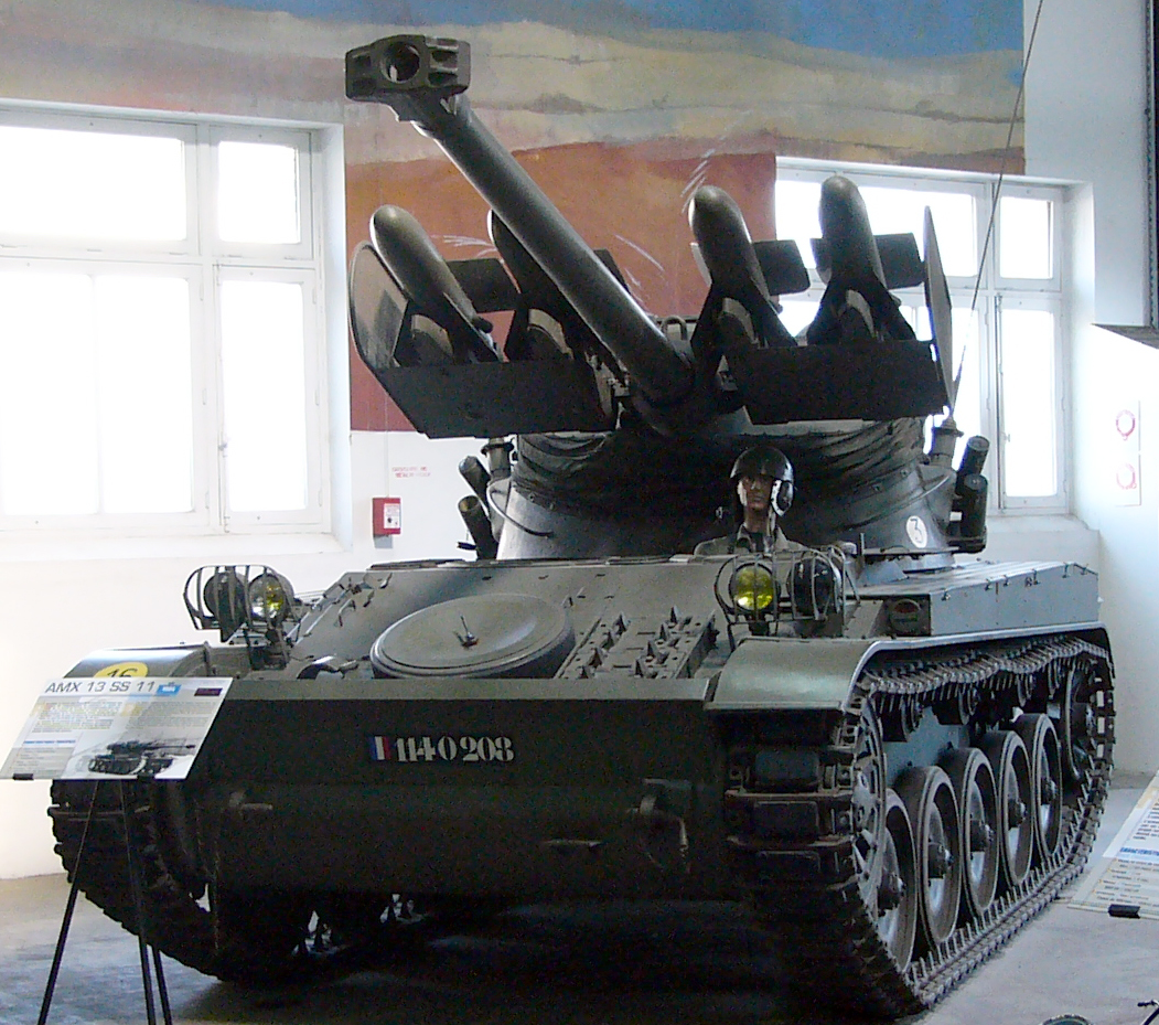 Char AMX 13 équipé de 4 missiles SS 11 (Musée des blindés de Saumur en printemps 2011